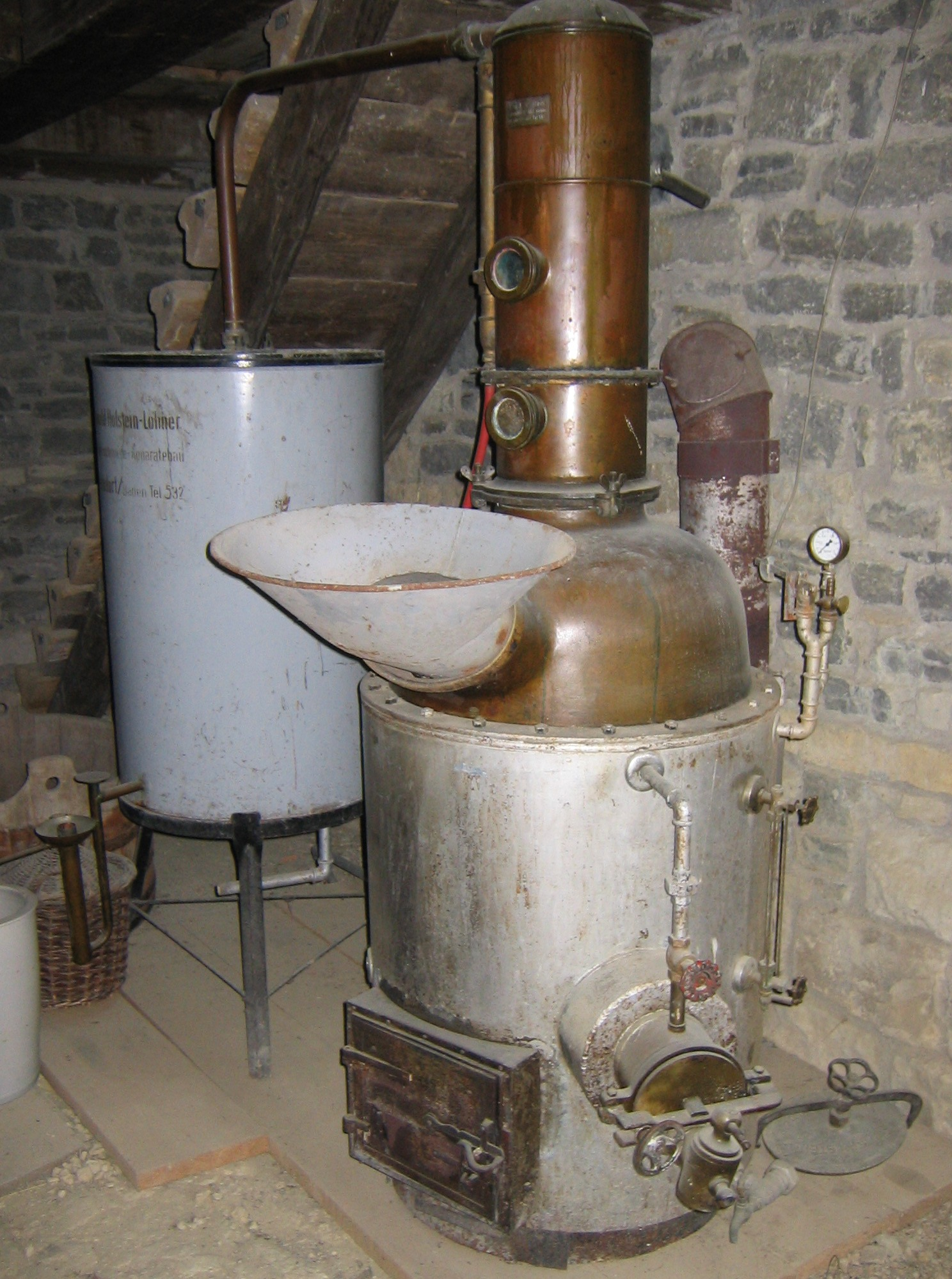 Schnapsbrennkessel im Freilichtmuseum Neuhausen ob Eck. Stellt vermutlich eine Geheimbrennerei dar, also eine Herstellung von Branntwein in einer der Branntweinmonopolverwaltung nicht gemeldeten Anlage.